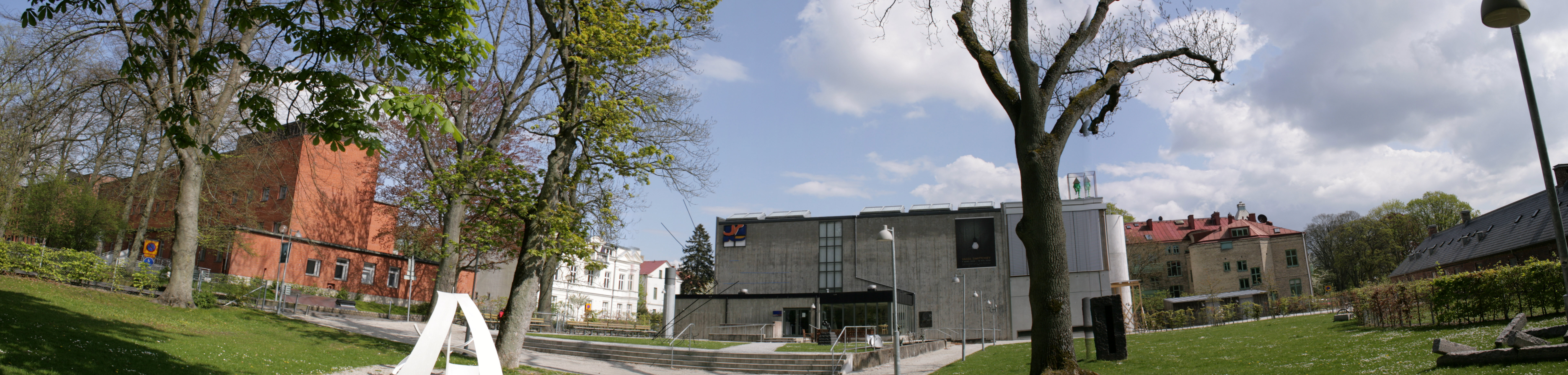 "Skissernas museum" in Lund, Sweden.